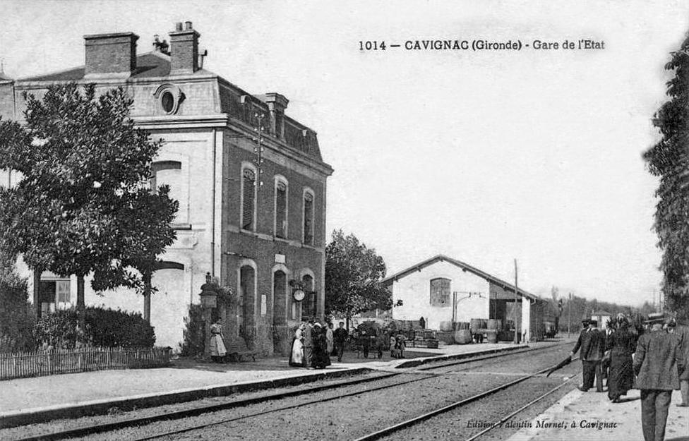 La gare de Cavignac vers 1900.